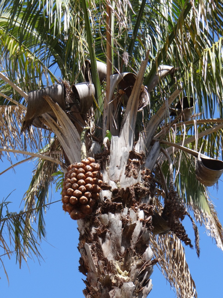 Attalea brasiliensis Glassman - ARECACEAE - Formosa - Goiás - Brasil.